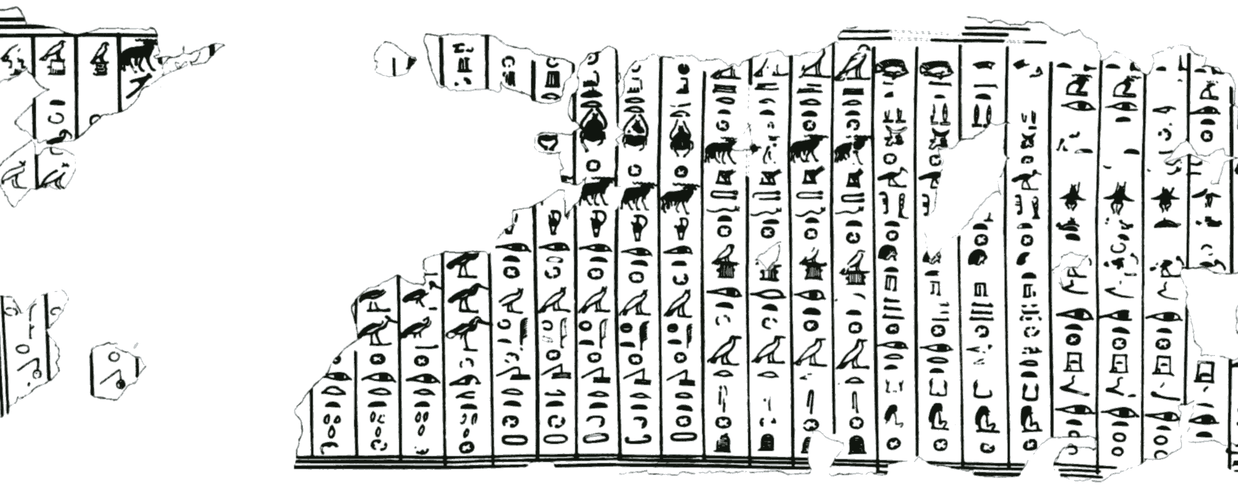 detail from the giza writing board/detail aus der schreibtafel des mesdjeru aus Gizeh